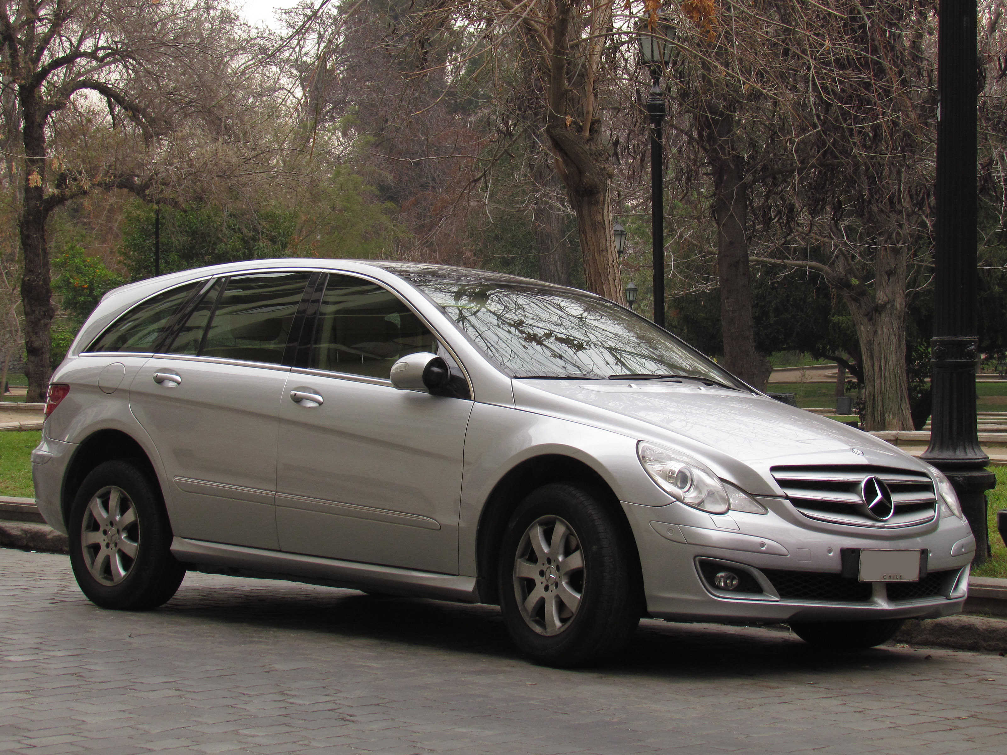 Mercedes Benz R 320 CDi 4Matic 2007